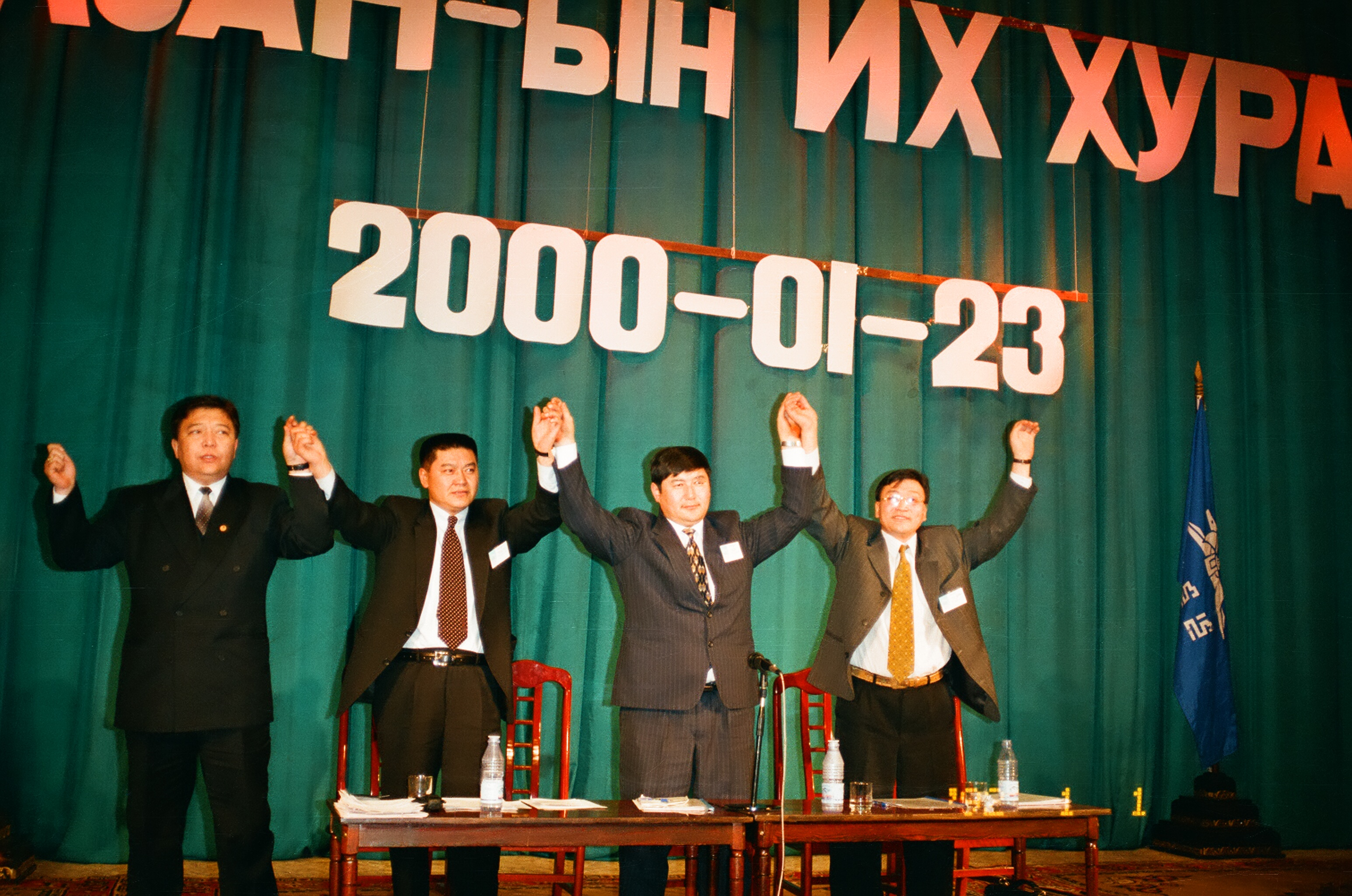 Монгол: 2000 онд Ардчилалын төлөөх таван нам нэгдэж одоогийн Ардчилсан намыг байгуулав.